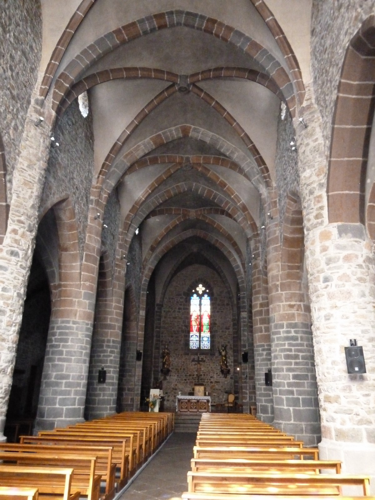 nef de l'Église de la paroisse catholique de Massiac, Cantal, France